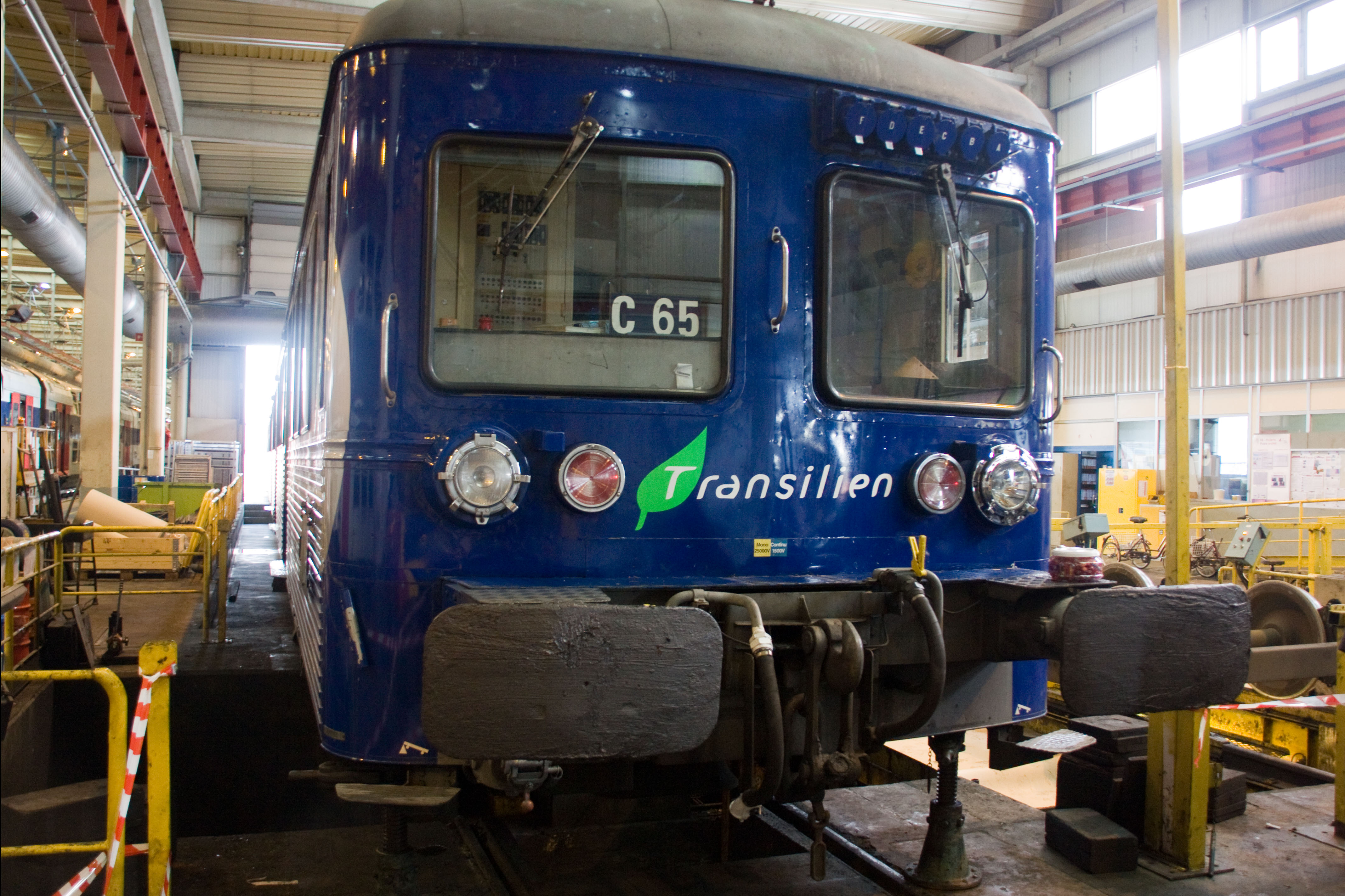 Journée Porte Ouverte du 20 mars 2010 au technicentre Paris Nord-Joncherolles, Villetaneuse, Seine-St-Denis, France